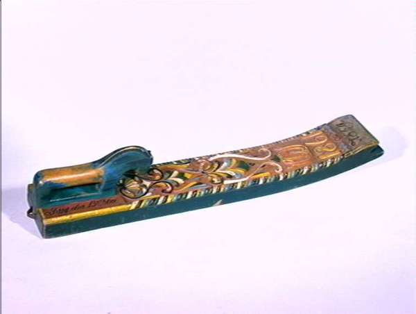 Mangletre datert 1861, fra Hol i Hallingdal, ant malt av Pål Rygg. Lengde 72 cm. Foto Anne-Lise Reinsfelt, Norsk Folkemuseum, NF.1911-0338